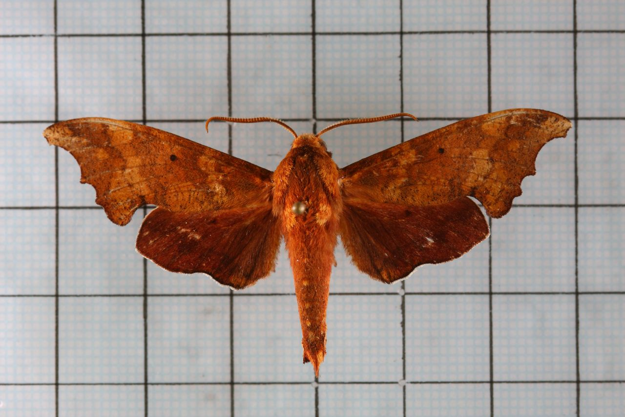 Smerinthulus flavomaculatus Inoue ,1989 黃雲天蛾